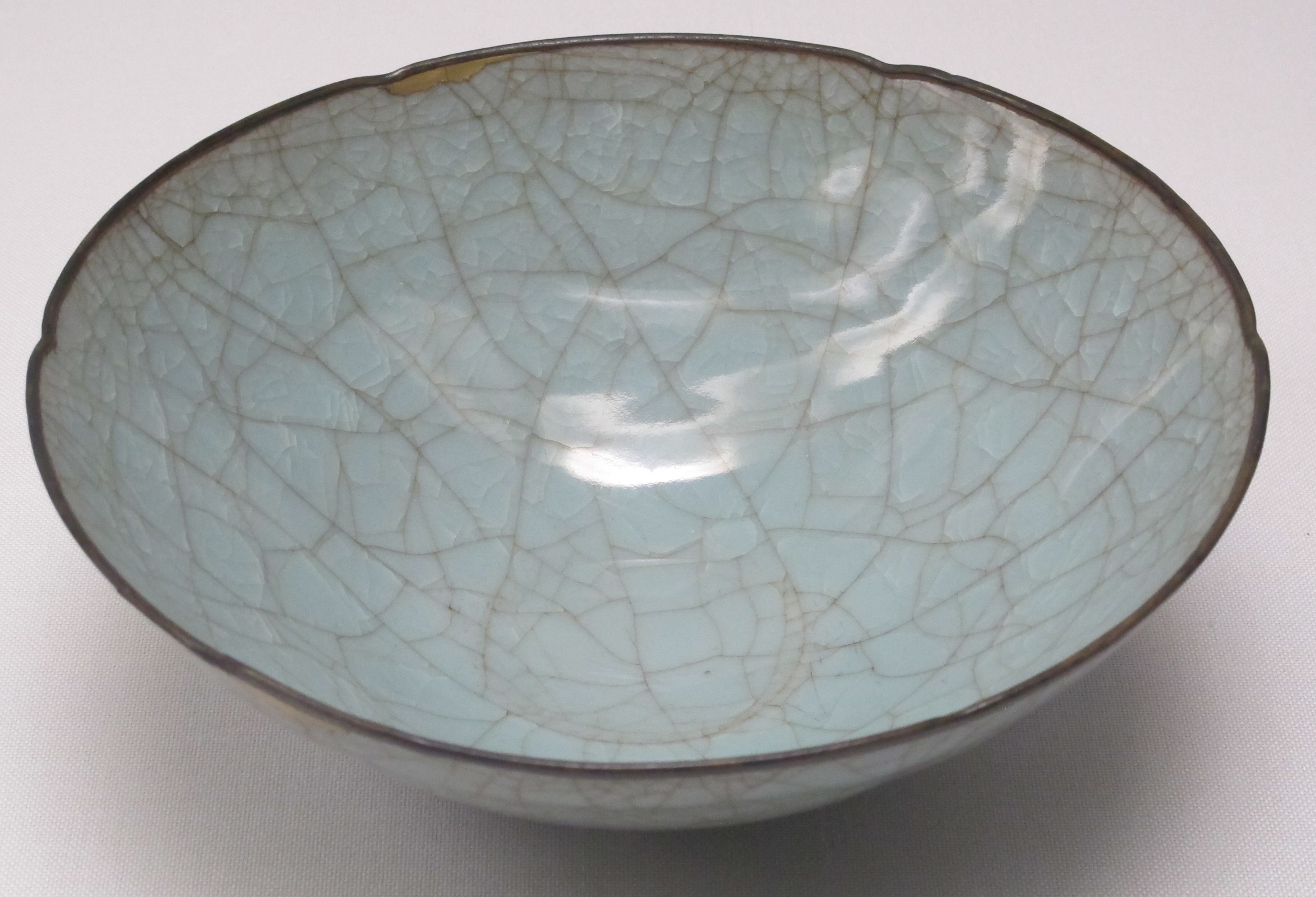 Dinastia song del sud, ciotola, XII-XIII sec